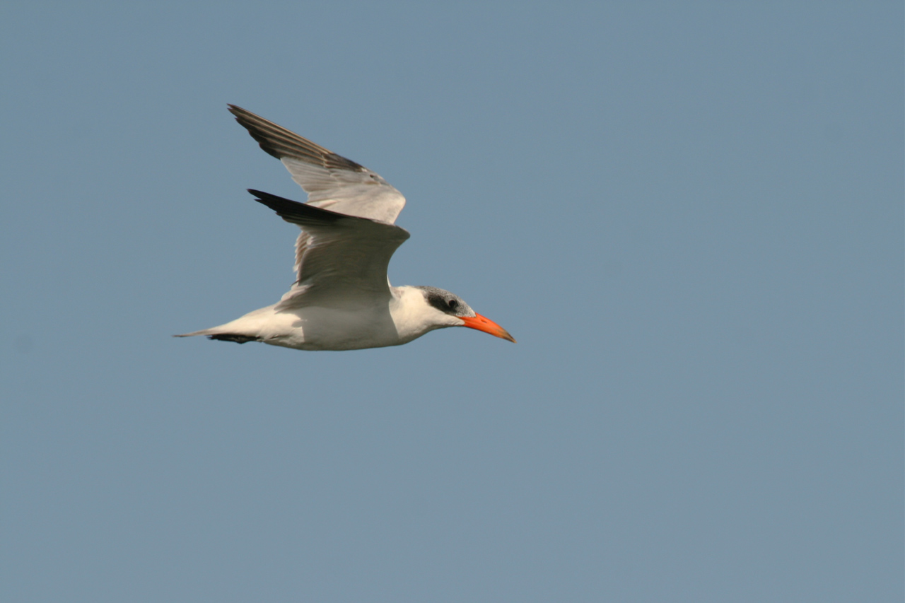 Hydroprogne caspia dans la reserve de Djoudj